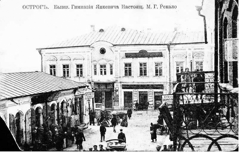 Гімназія в Острозі.